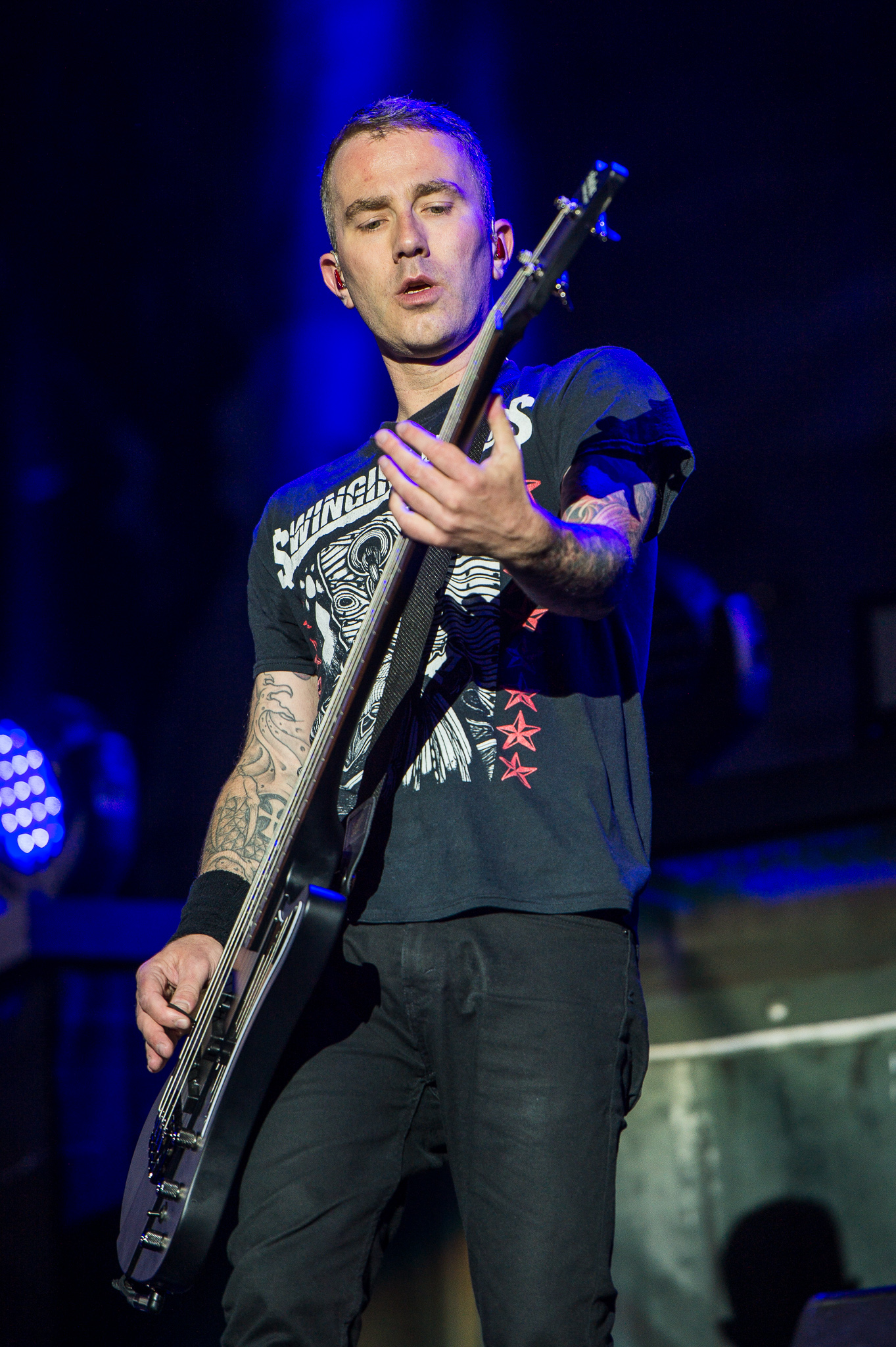 ARGO-Konzerte,Festival,Kaspar Boye Larsen,Konzert,Livekonzert,Livemusik,Musik,RiP,Rock im Park 2016,Seat Zeppelin Stage,Volbeat